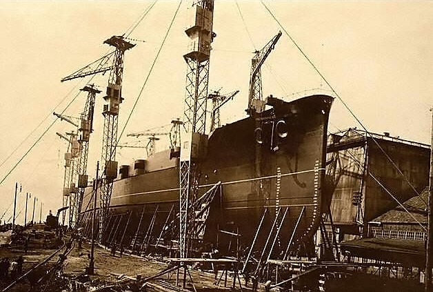 Schlachtschiff „Kaiserin Katherina die Große“ (Imperatriza Jekaterina Welikaja) auf der Helling beim Bau